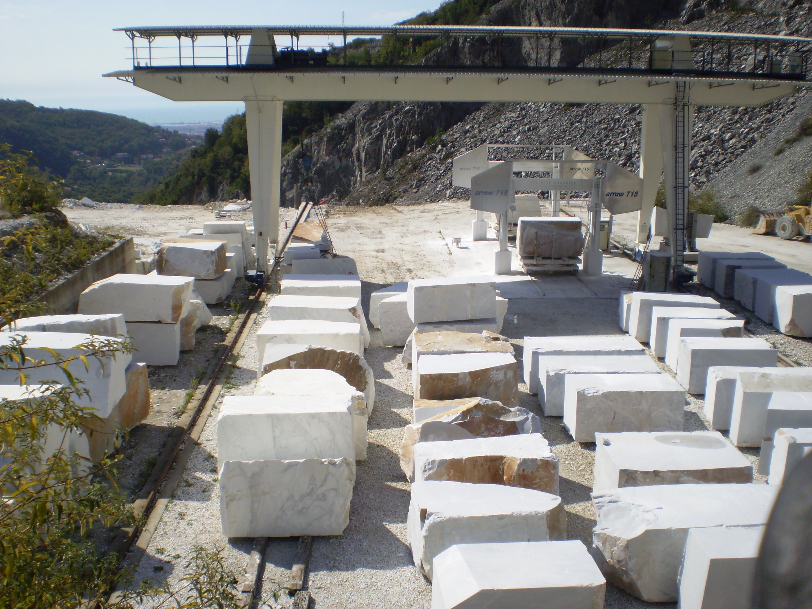 Marble blocks at Carrara, Province Massa-Carrara, Italy. Bacino di Fantiscritti